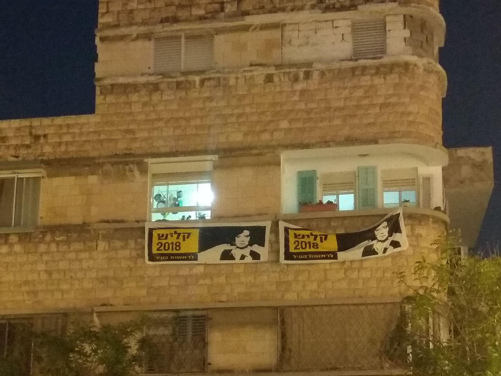 שלטי בחירות של המועמדת עינת קליש